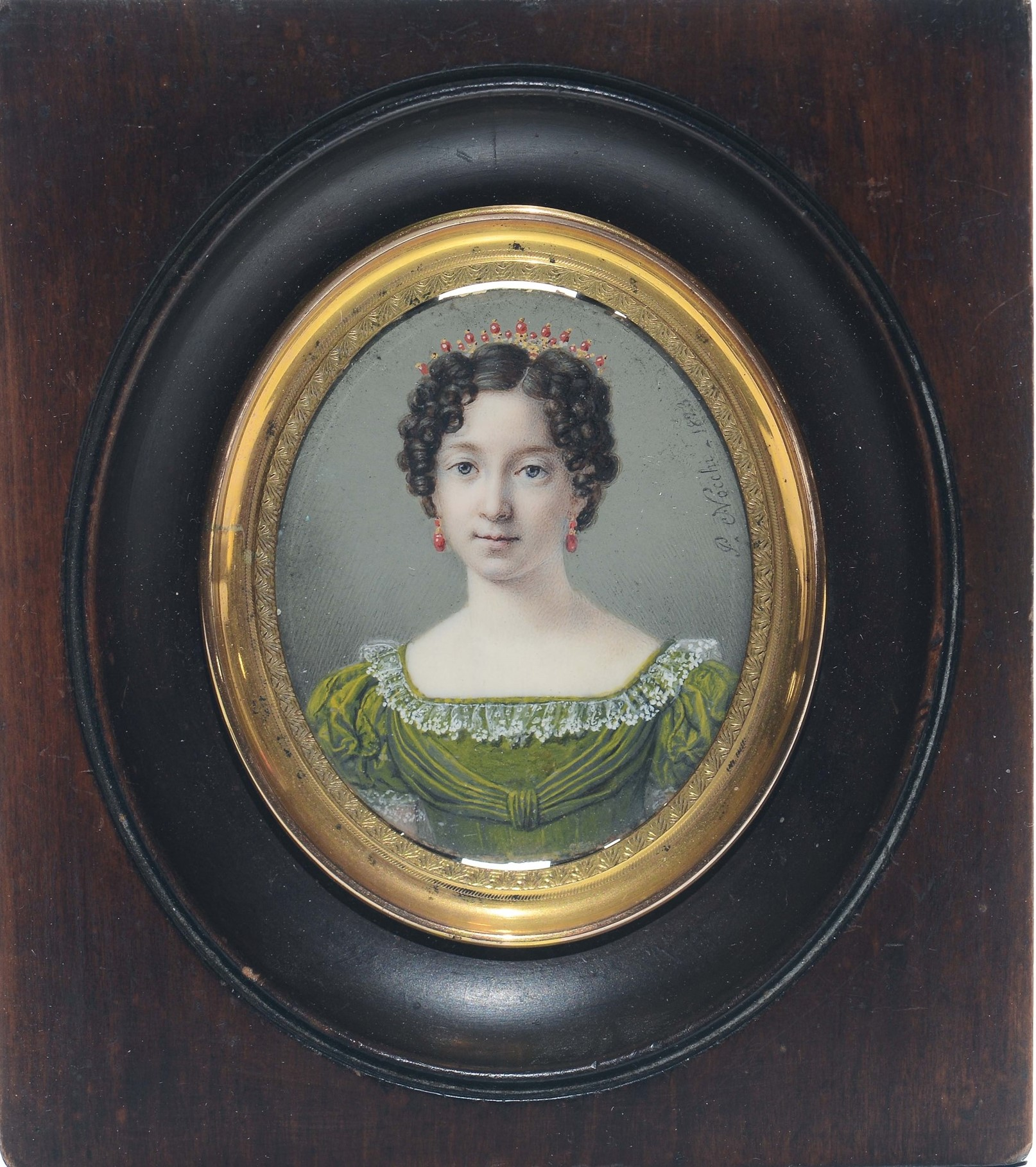 Miniatura de la princesa María Luisa Carlota de Borbón, hija de Luis I de Etruria y María Luisa de Borbón, duquesa de Lucca